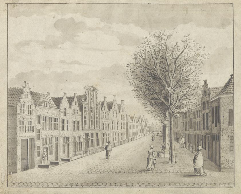 Gezicht op de Garenmarkt zoals die eruit zag vóór 12 januari 1807. Jacob Timmermans. 1807.